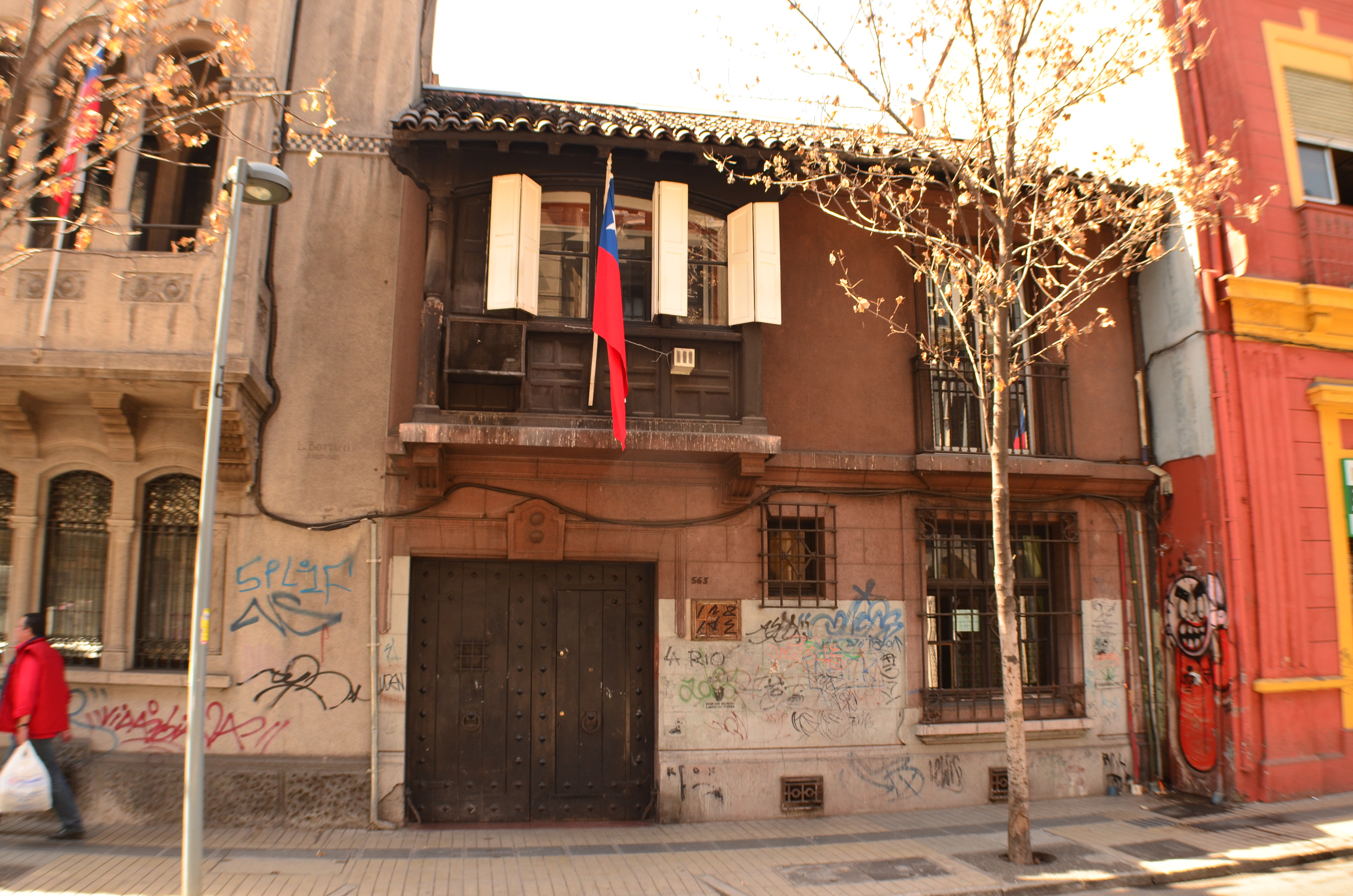 Edificio sede del Colegio de Enfermeras de Chile This is a photo of a national monument in Chile: 2102